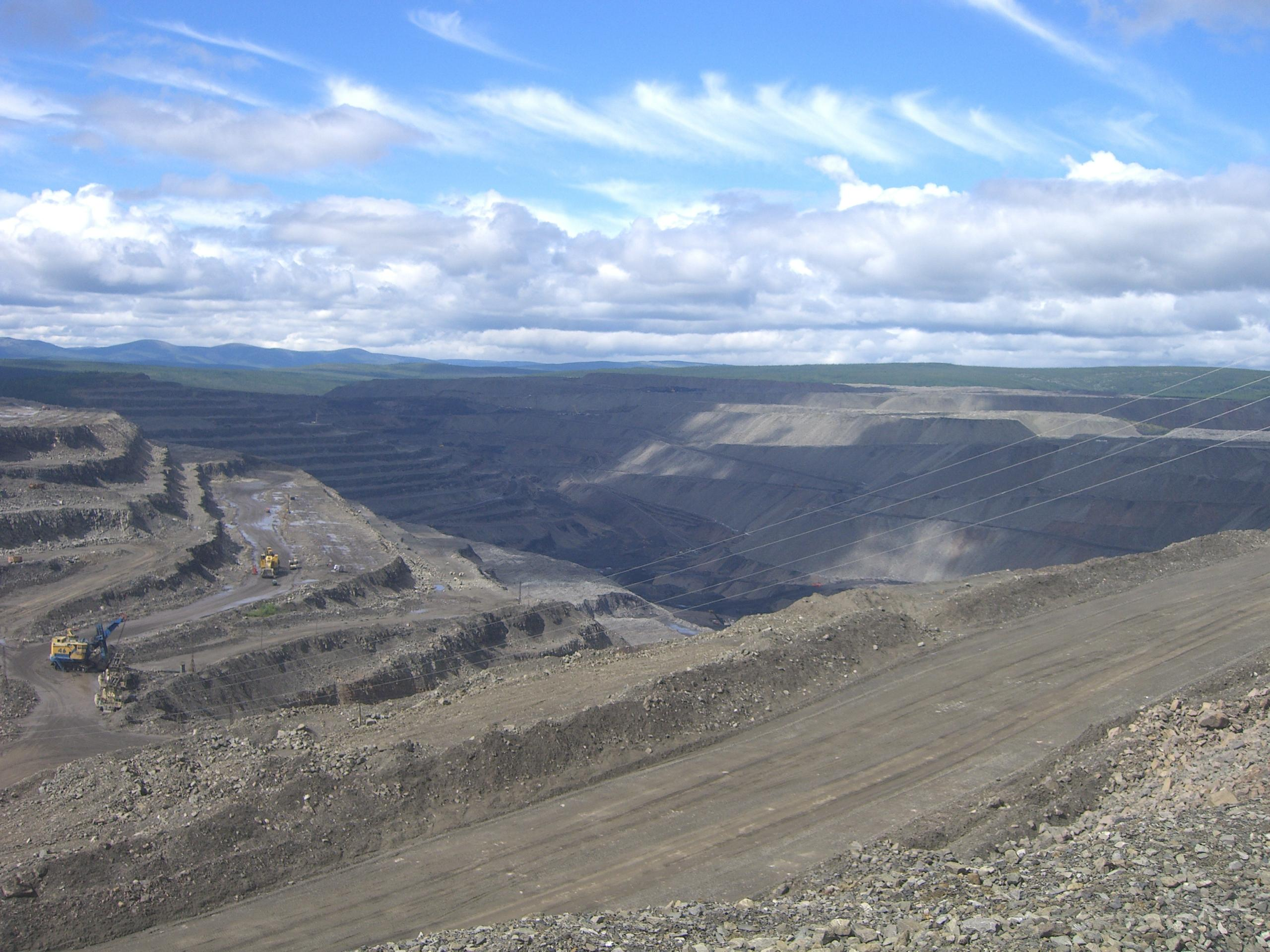 Автор: Светлана Иванова